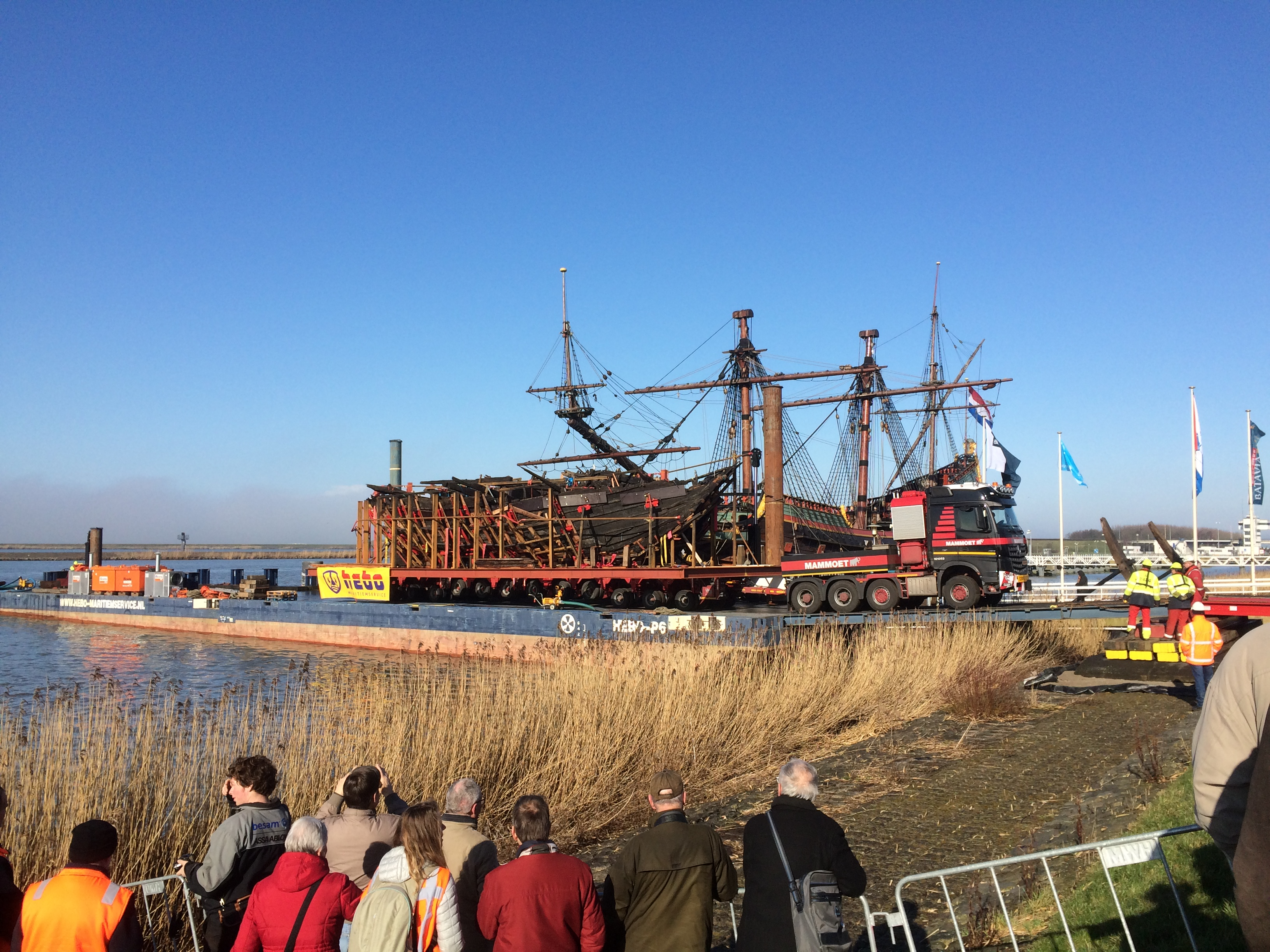 transport IJsselkogge naar Lelystad Nederland